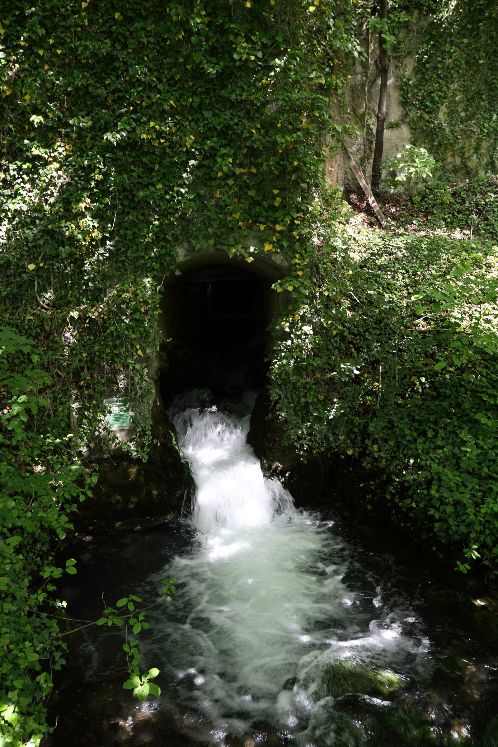 Hammerbachsprung